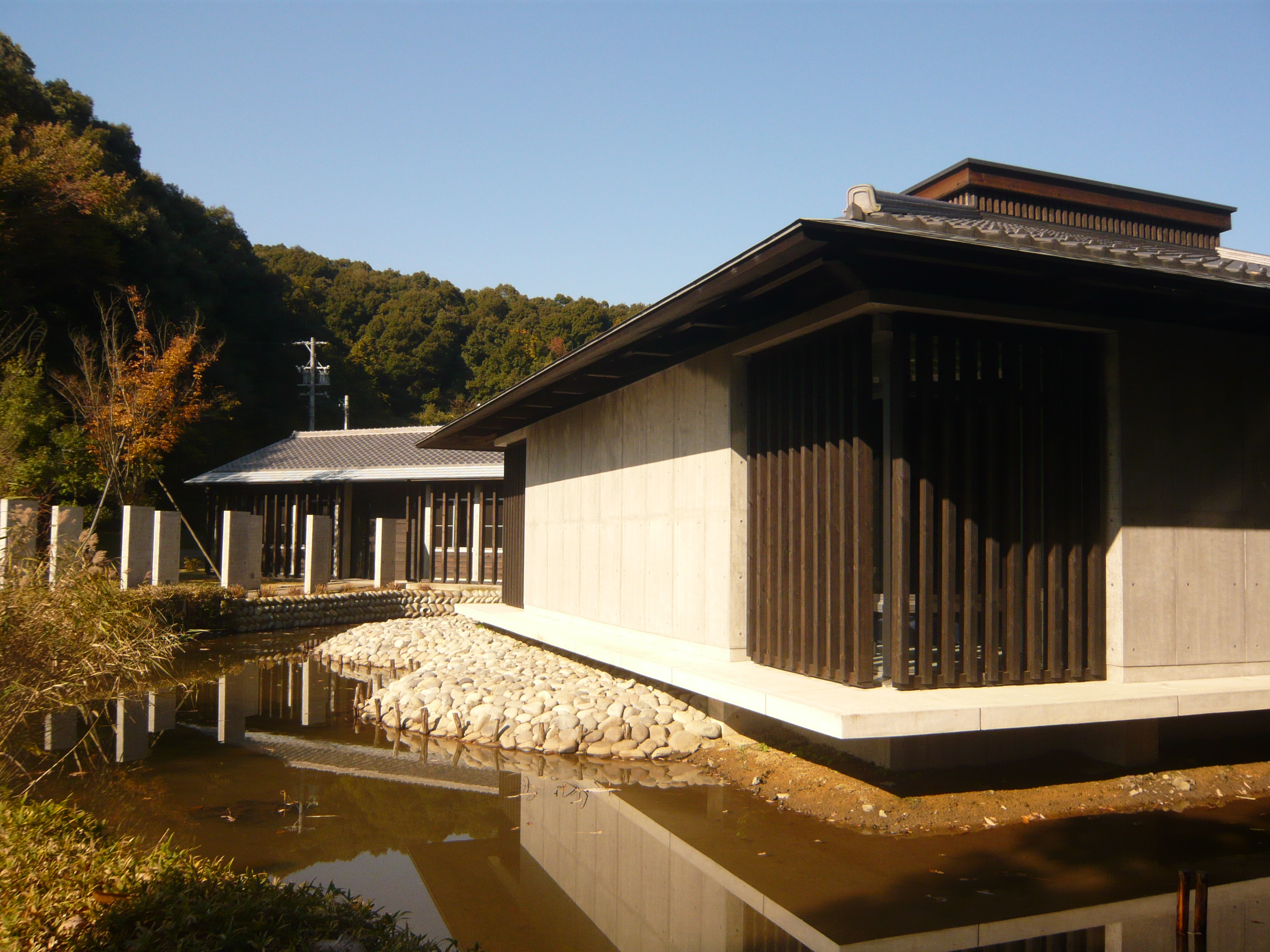 Enku Museum 関市円空館（関市円空館）,Seki,Gifu,Japan（岐阜県関市）で撮影。